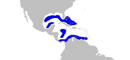 Distribution map for Etmopterus virens